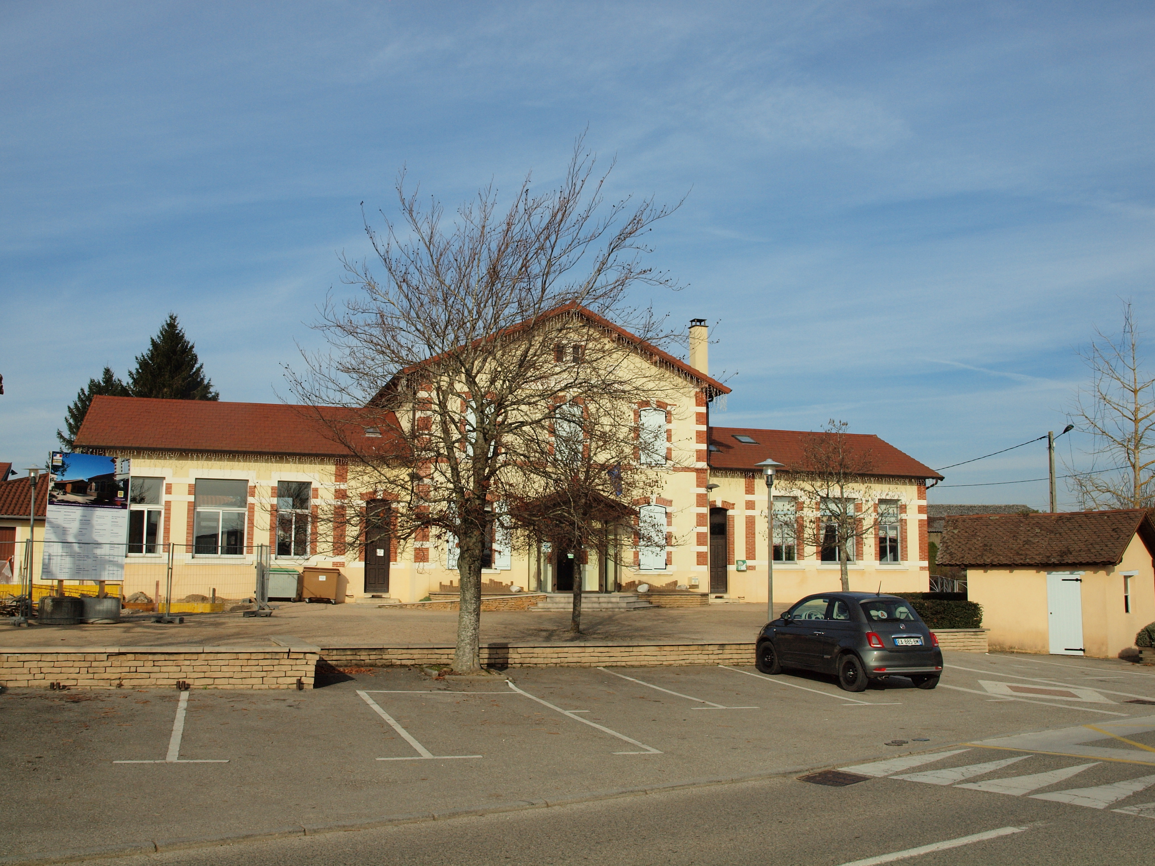 Maubec (Isère, France)